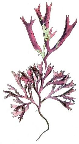 Formen von Gigartina mamillosa Ag., natürl. Grösse; = Mastocarpus stellatus